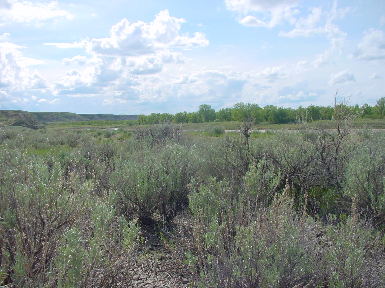 Dinosaur Provincial Park